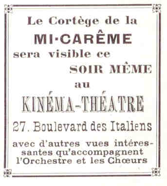 Annonce publicitaire de cinéma